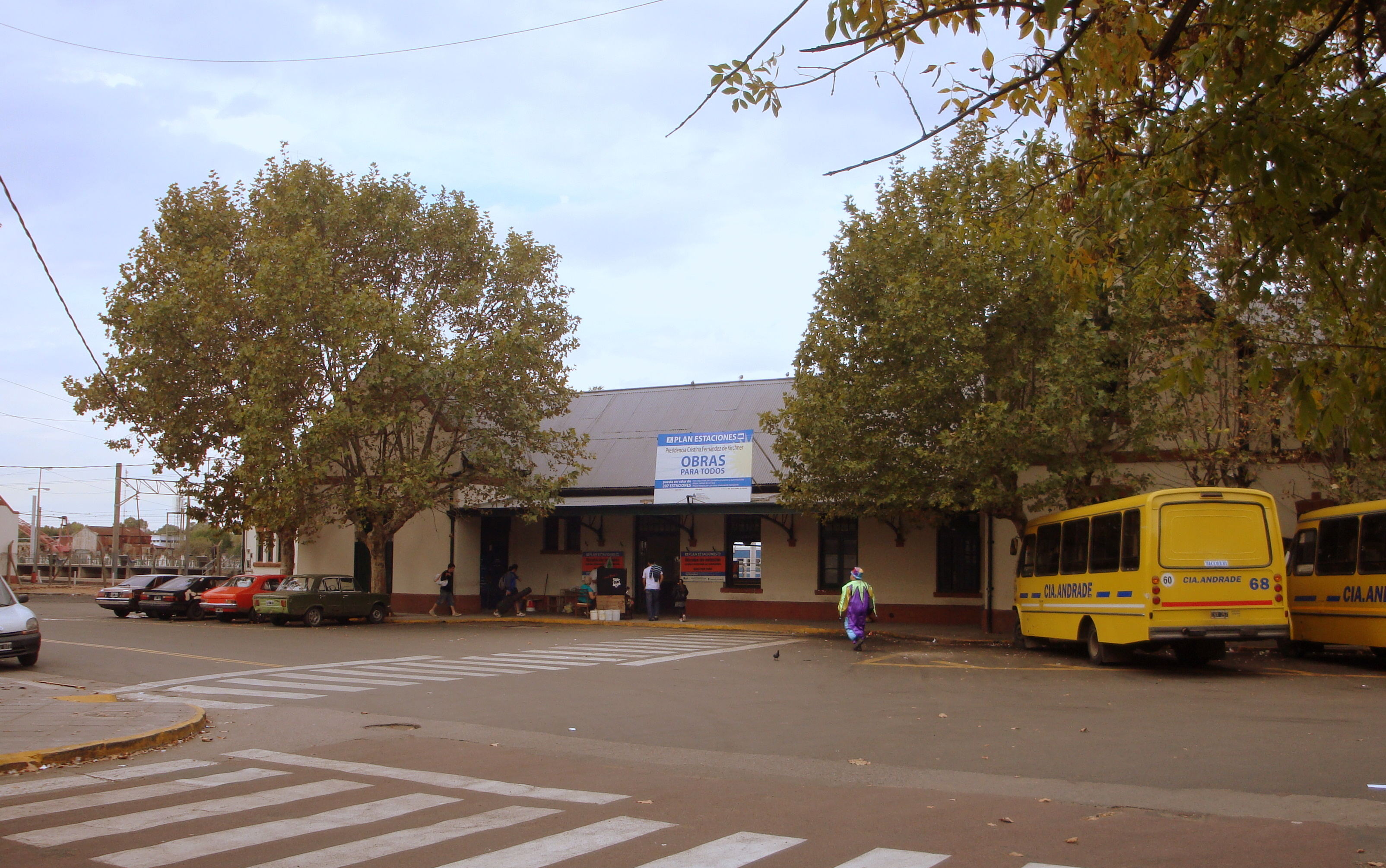 Vista externa de la Estación Remedios de Escalada.